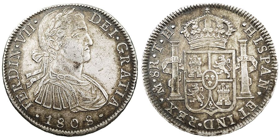 Moneda de vuit rals encunyada en 1808 al regnat de Ferran VII d'Espanya. És una peça de plata fabricada a Ciutat de Mèxic.